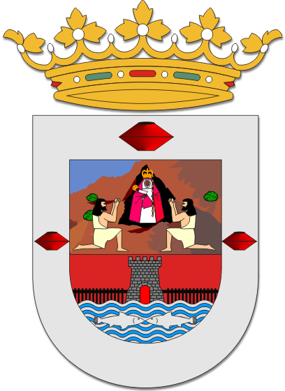 Escudo de Candelaria, en Santa Cruz de Tenerife (España)